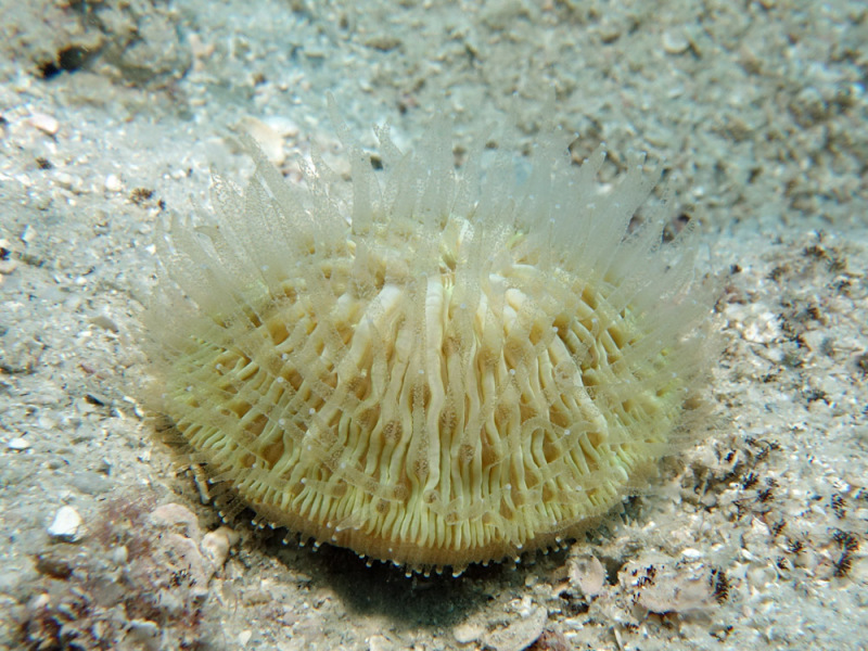 Cycloseris cyclolites, a 18 m de profundidad, en isla Lizard. ID reviewed by Dr. Bert W. Hoeksema.